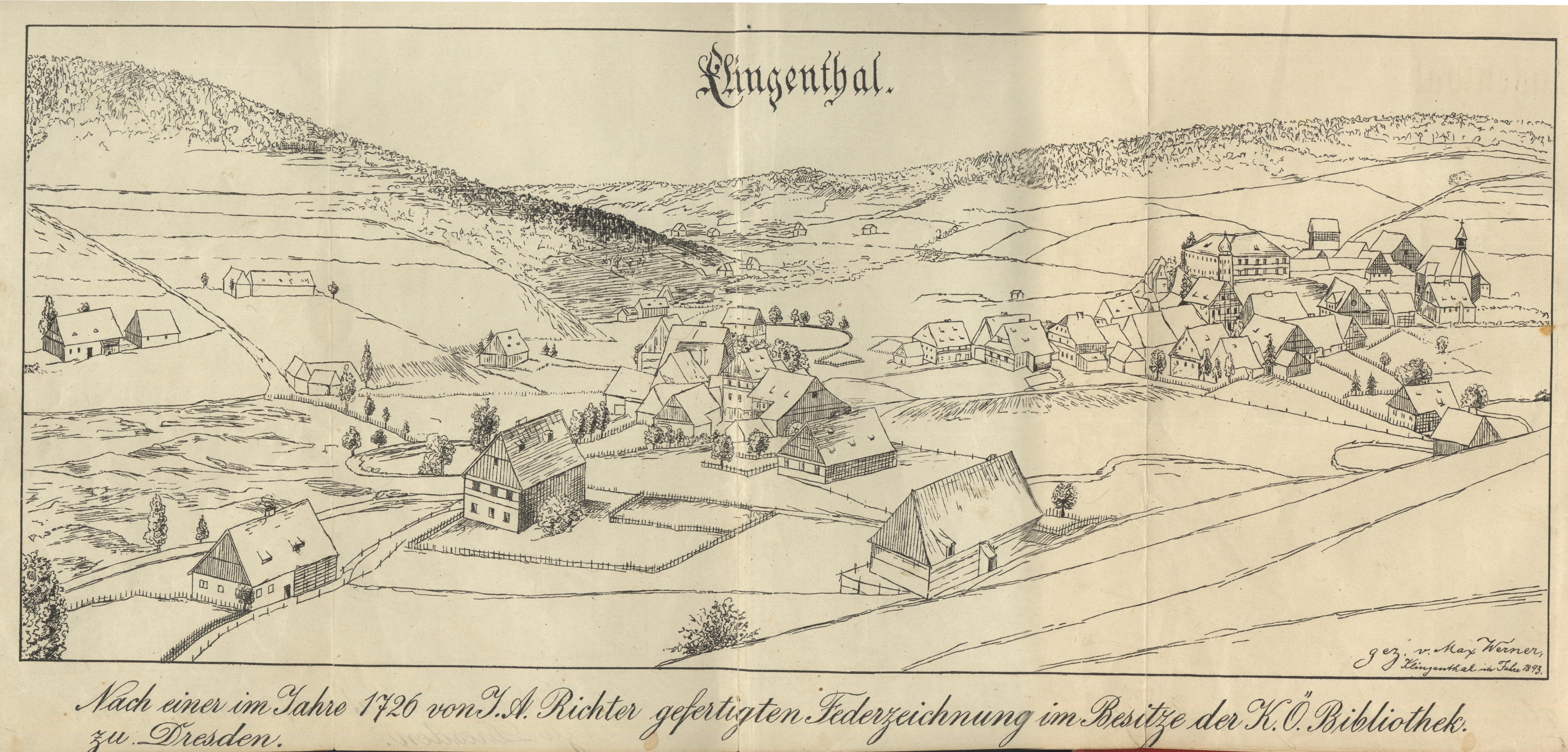 Blicke in die Vergangenheit Klingenthals und des gleichnamigen Amtsgerichtsbezirks